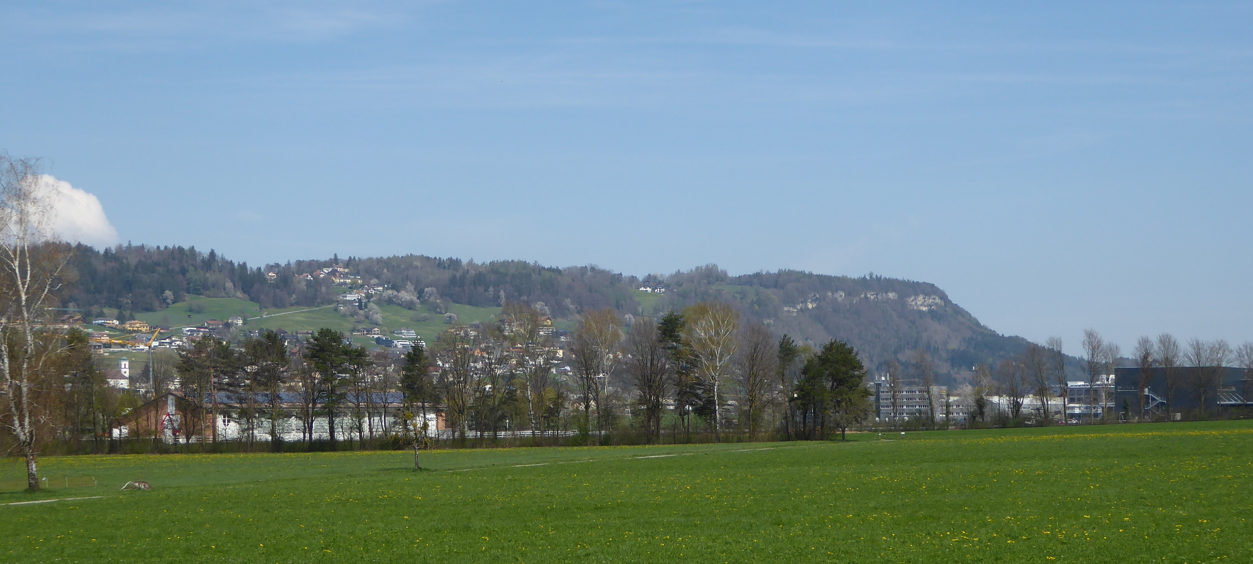 Blick von Schaanwald auf die markenten Felsen oberhalb des Tostner Walds